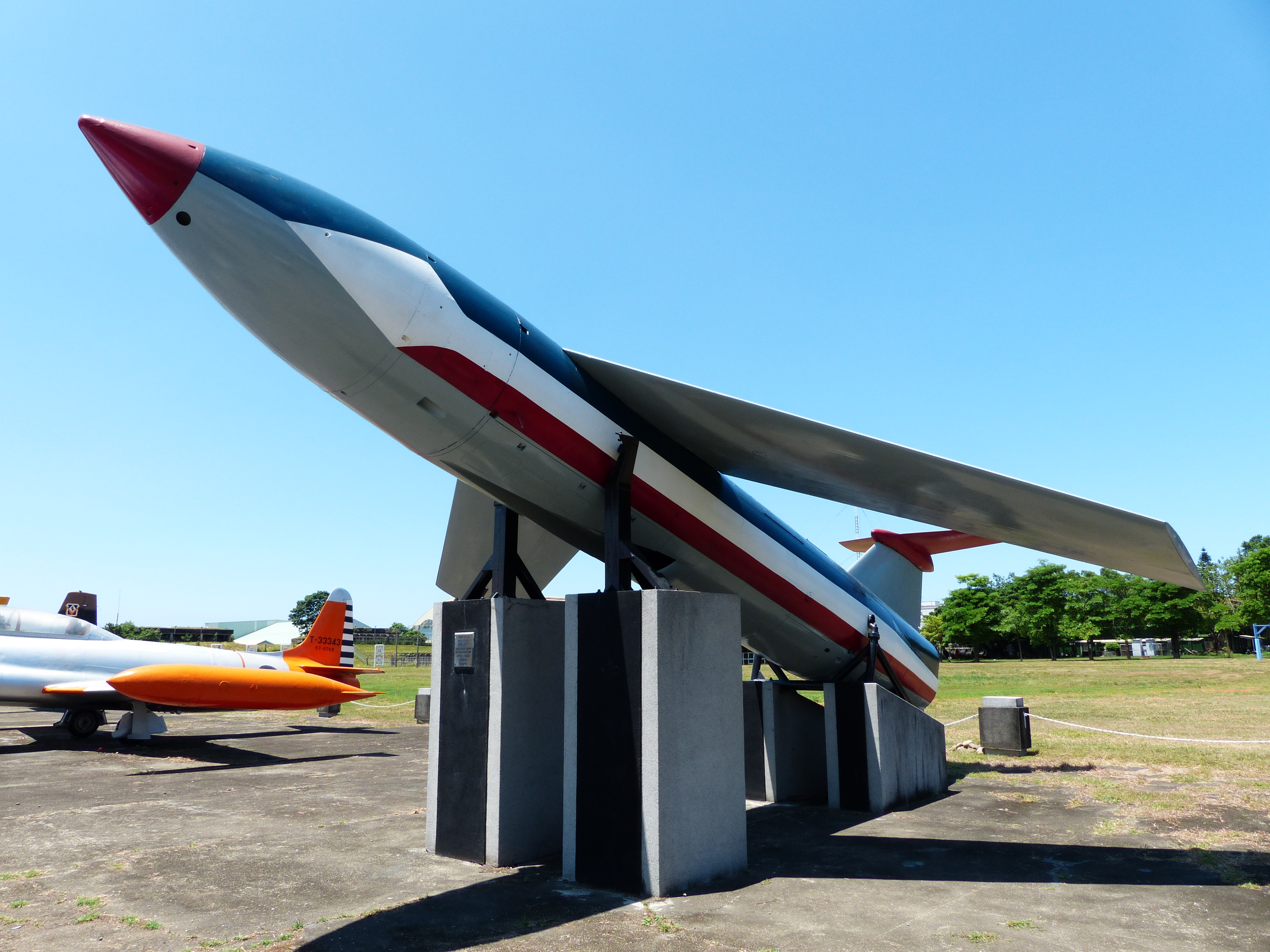 空軍臺南基地飛機展示區的MGM-1C屠牛士地對地巡航飛彈左前方。